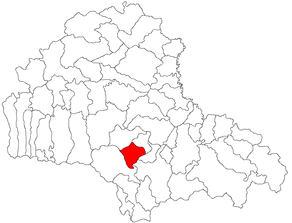 Categorie:Hărţi ale judeţului Braşov